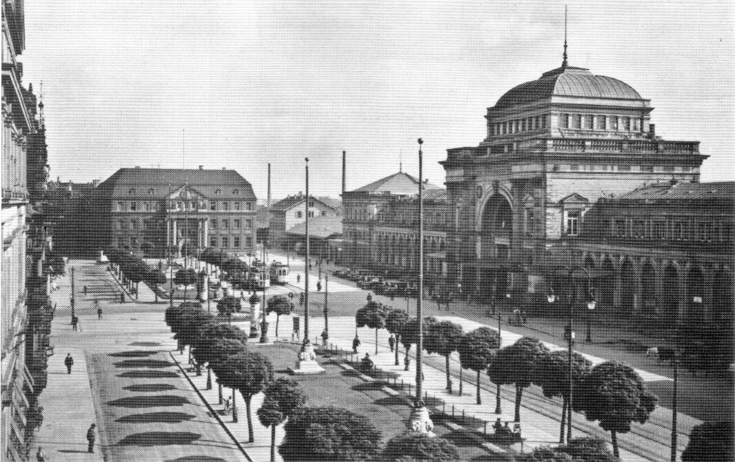 Mannheim, Bahnhofsplatz, ca. 1925 (Postkarte)